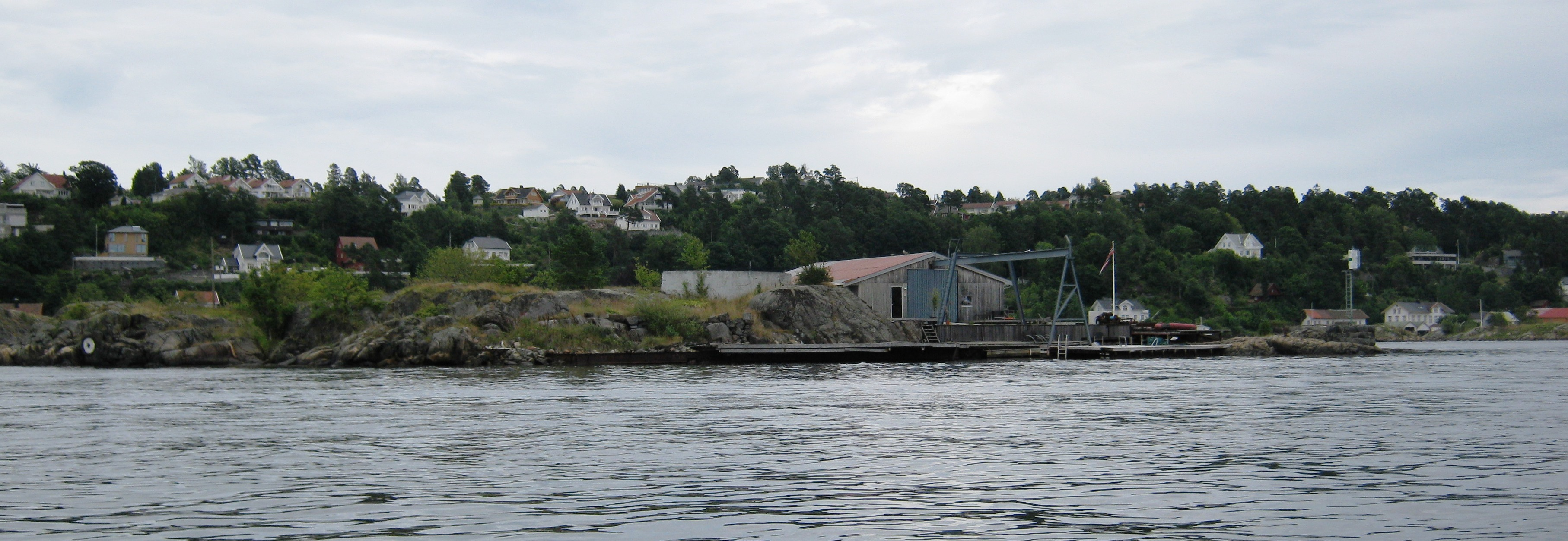 Lille Skottholmen i Galtesund, Arendal, Norge